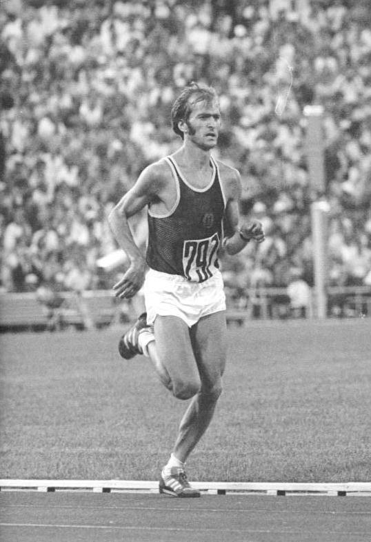 ADN-ZB Mittelstädt 01.08.80 Moskau: Olympia. Cierpinski wiederholte Olympiasieg von Montreal-Unter ohrenbetäubendem Jubel der 100.000 Zuschauer trifft Waldemar Cierpinski (DDR) nach 2:11:03,0 h als erster Marathonläufer im Stadion ein und wiederholte seinen Olympiasieg von 1976 in Montreal. Der 29jährige Hallenser ist damit nach Abebe Biklia der zweite Marathonläufer, der zweimal hintereinander Olympiasieger wurde.